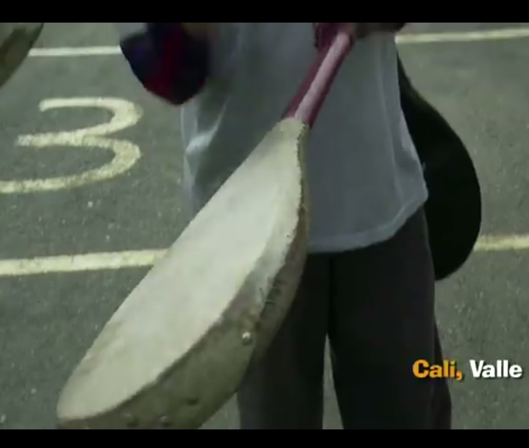 Bombo (raqueta) de Chaza